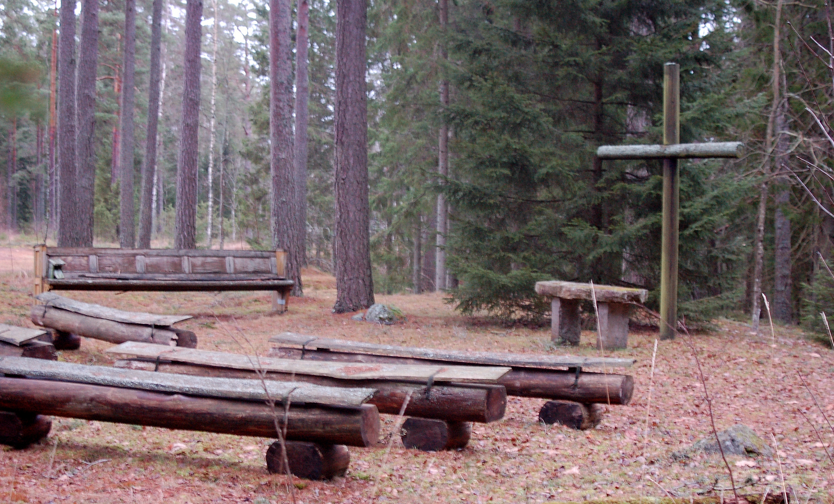 Fagerlids kyrkoruin.